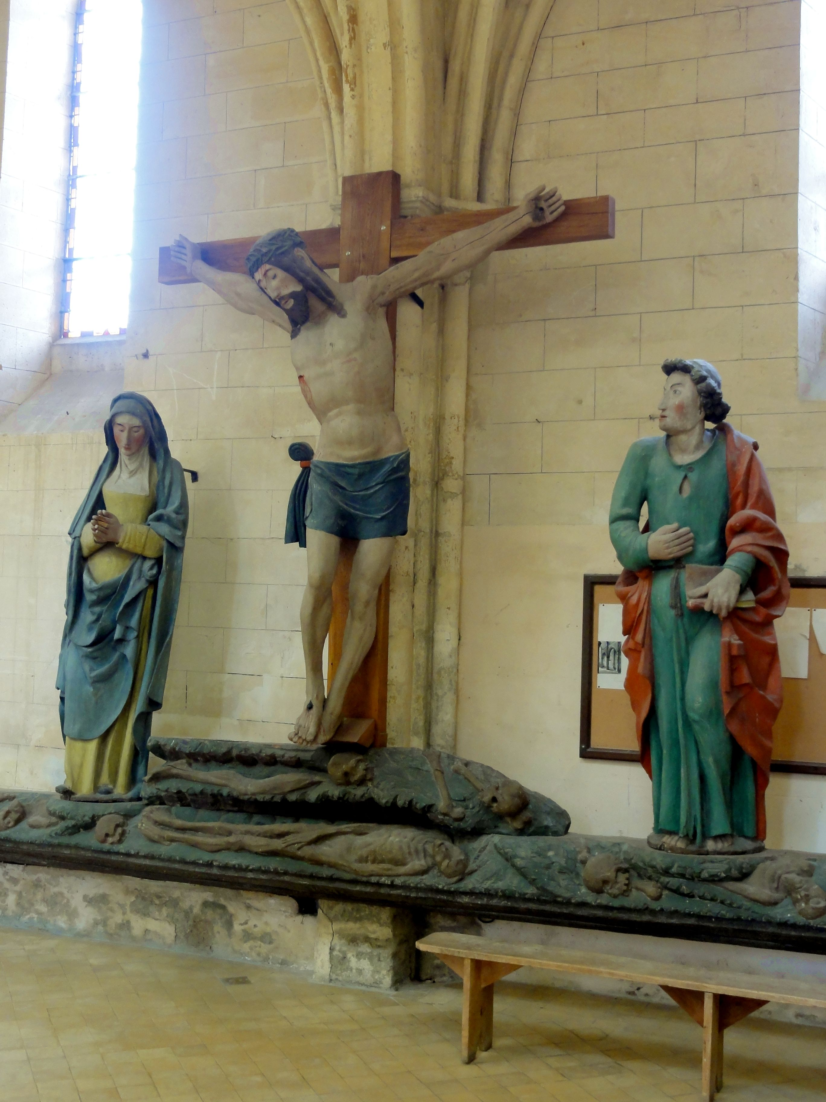 Poutre de gloire.